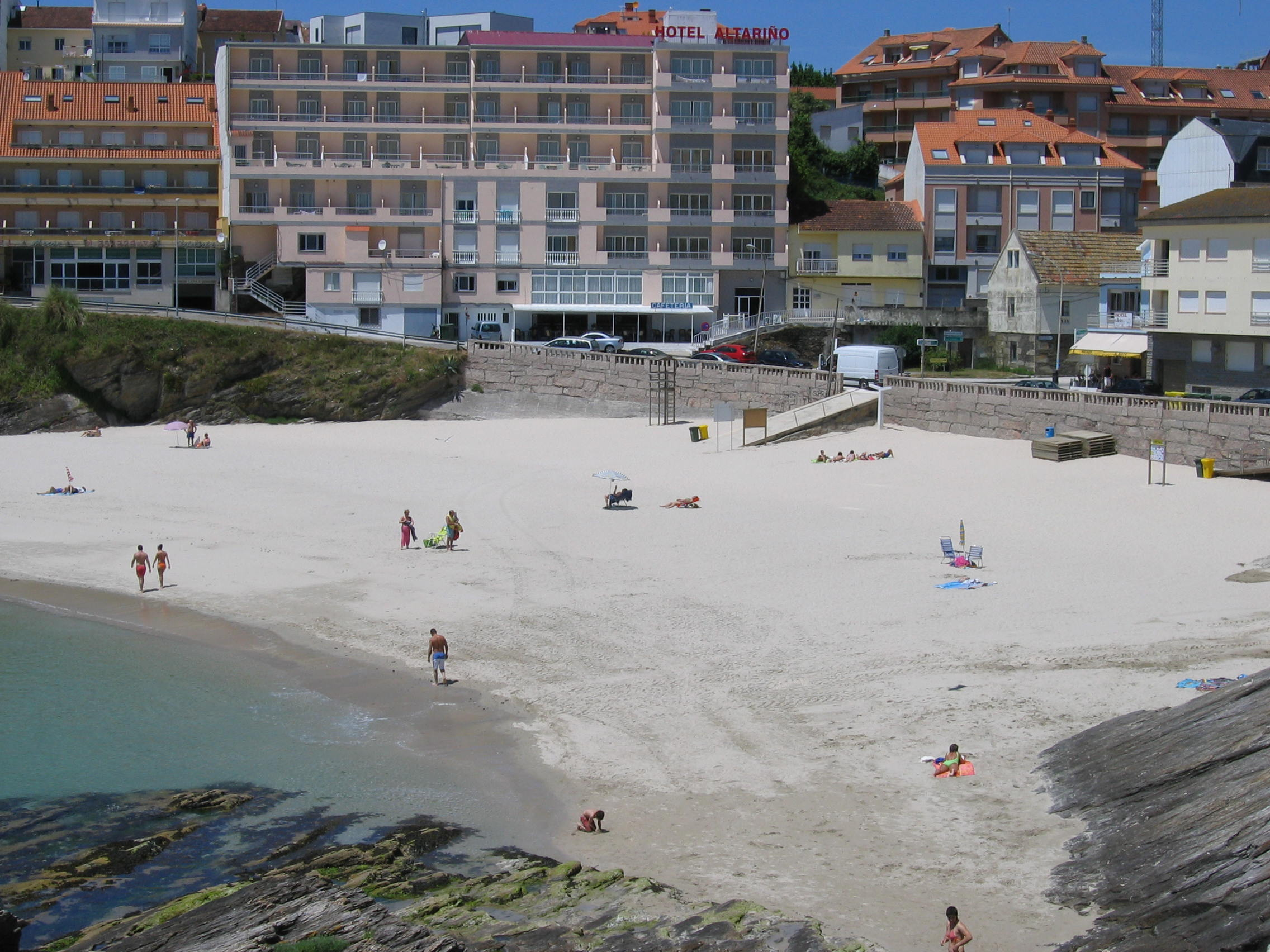 Praia de Caneliñas (Portonovo, Sanxenxo *